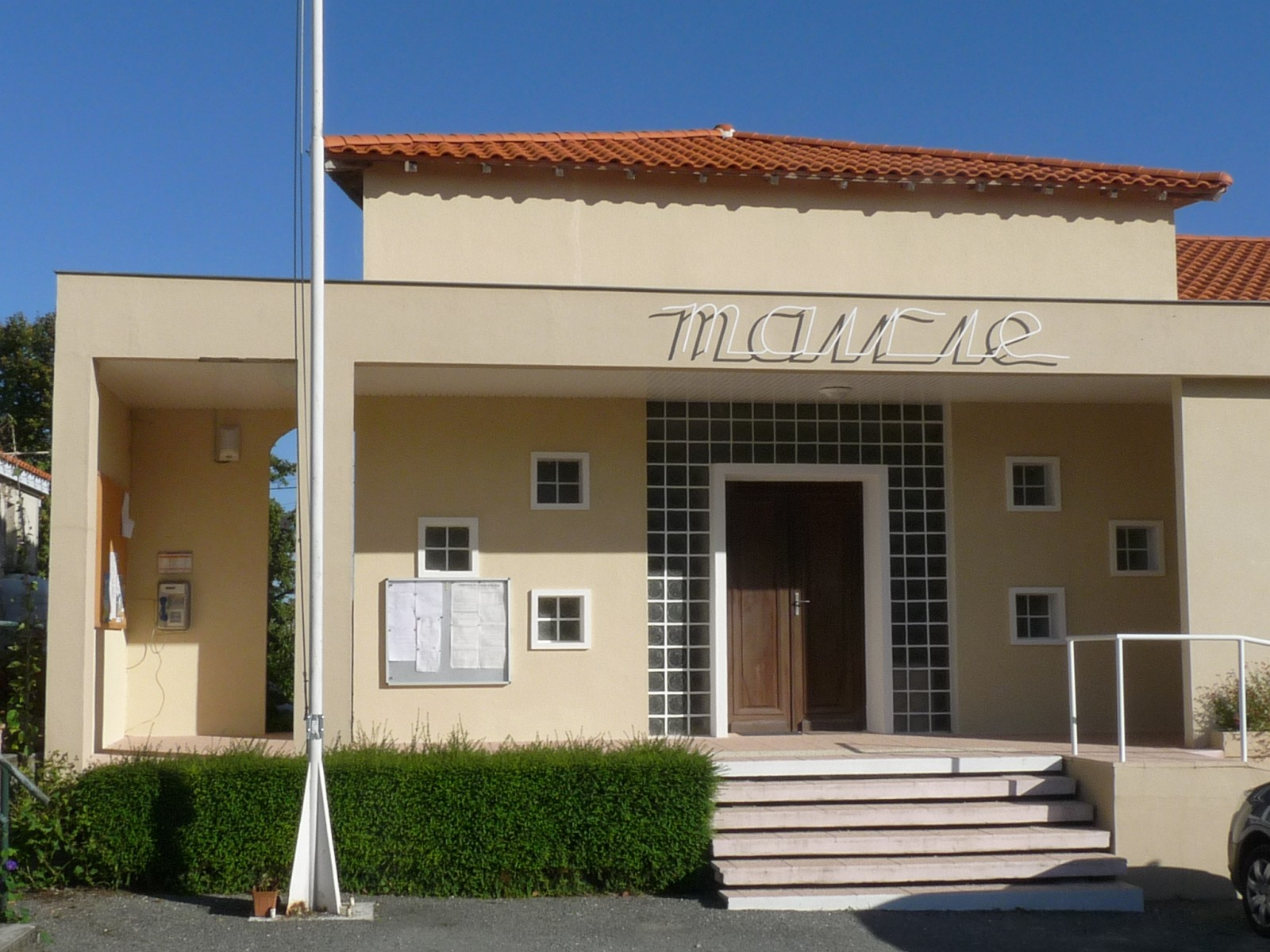 Mairie de Vibrac, Charente-Maritime, France